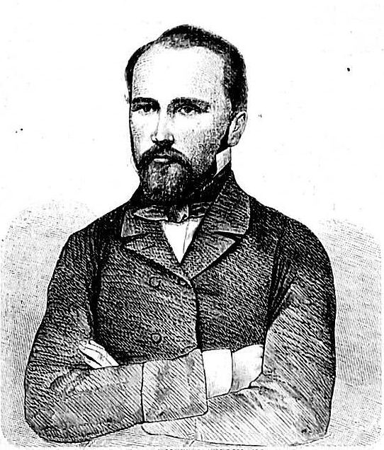 Ewaryst Estkowski 1820-1856